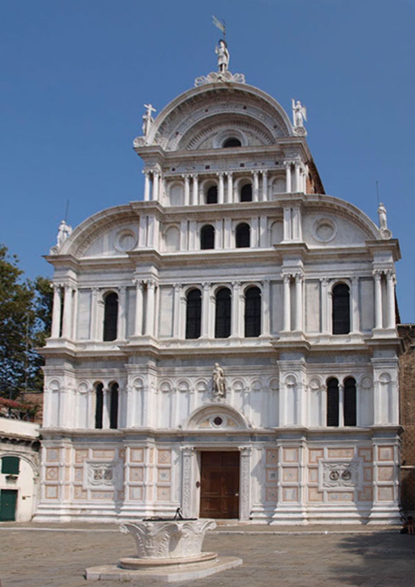 Вера да поццо. Криниця перед церквою Сан-Джорджо дей Гречі. Венеція